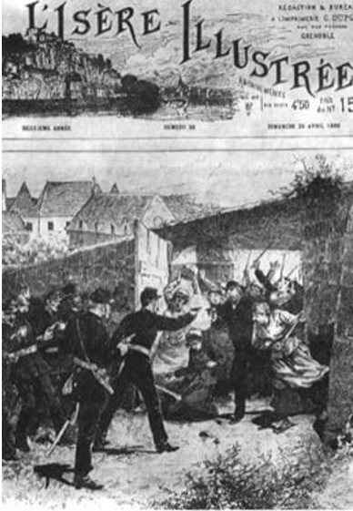 L’entrée des gendarmes dans l’usine de Châteauvilain, illustration. L'Isère Illustrée du 25 avril 1886.